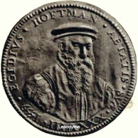 Medaille von Steven van Herwijck mit dem Porträt des Reeders Gillis Hooftman, Antwerpen 1559